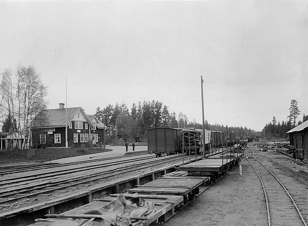 Neva station vid Säfsnäs Järnväg. Bildnr: SEVA_BAB67_20 Arkivbildare: Billerud AB